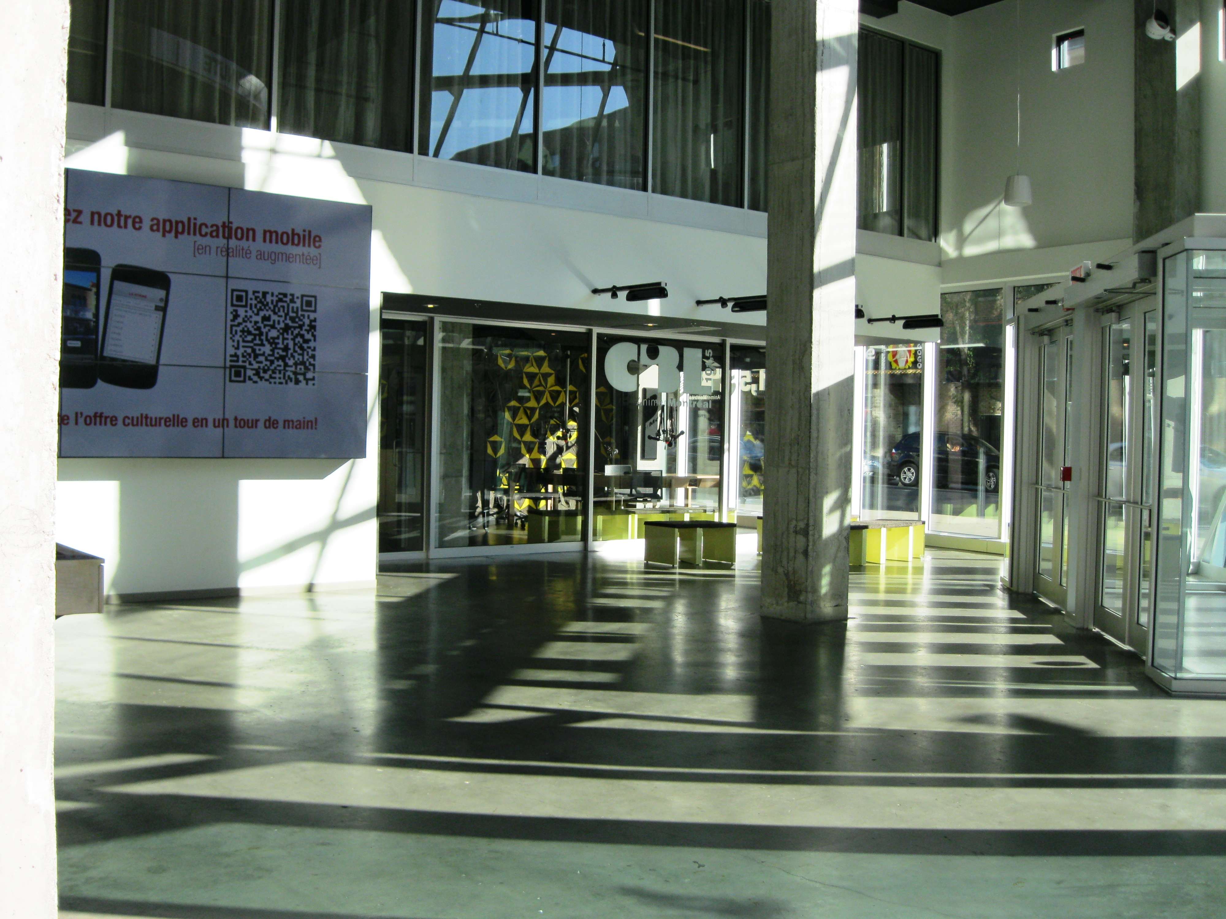 Studio de CIBL-FM 101,5, au 2-22 rue Sainte-Catherine Est, Montréal